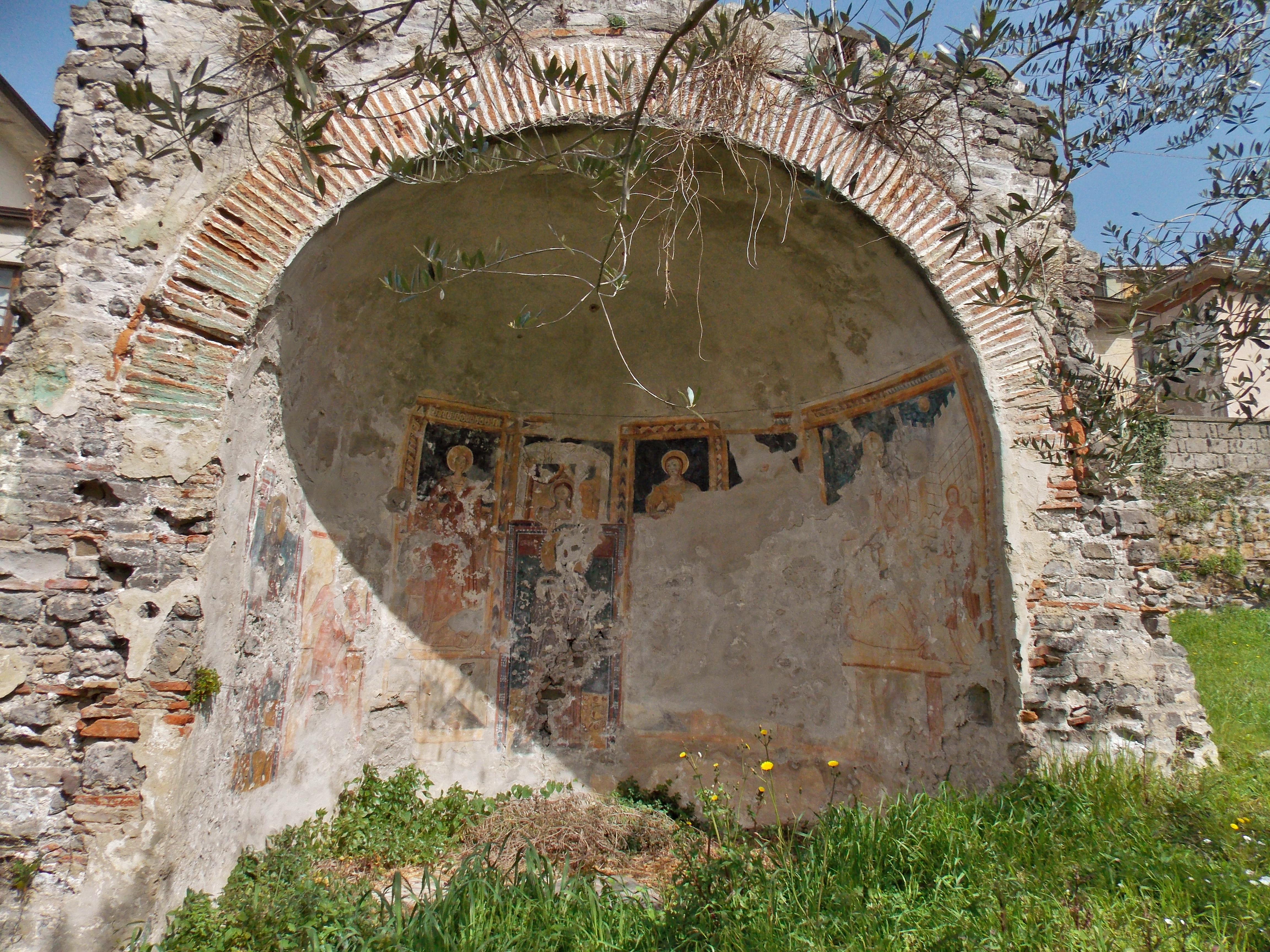 I ruderi dell'abside dell'oratorio di San Giorgio a Faicchio (BN) con gli affreschi, dipinti fra il X e il XV secolo